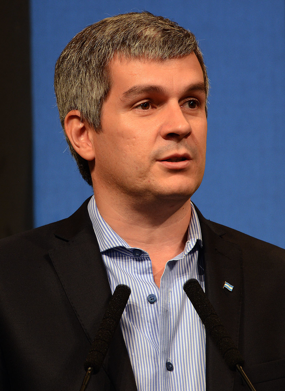 Marcos Peña, Jefe de Gabinete de la Nación Argentina